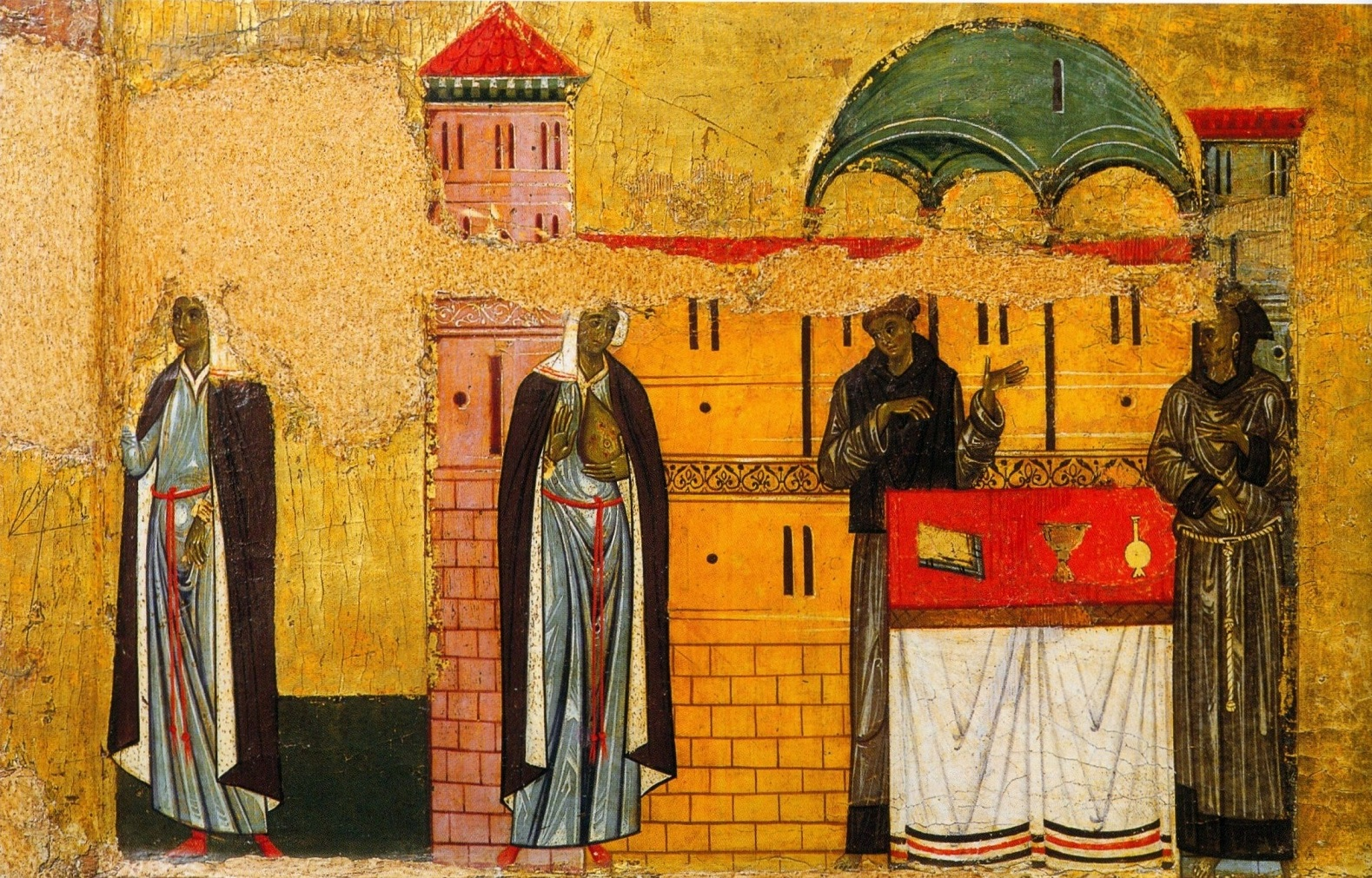 detail